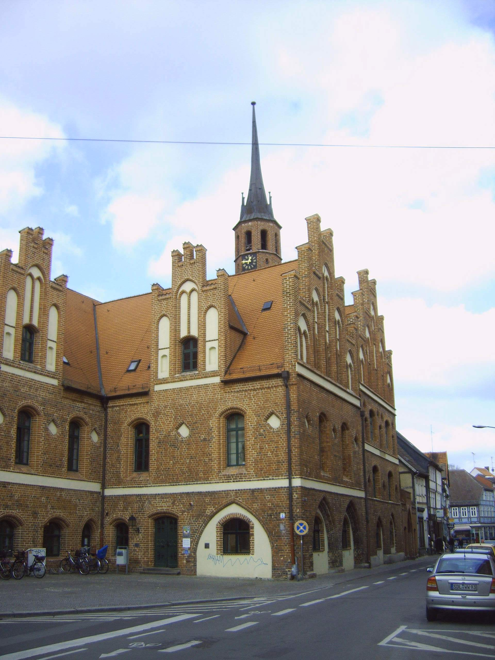 Altes Rathaus und Sitz des Amtsgerichtes